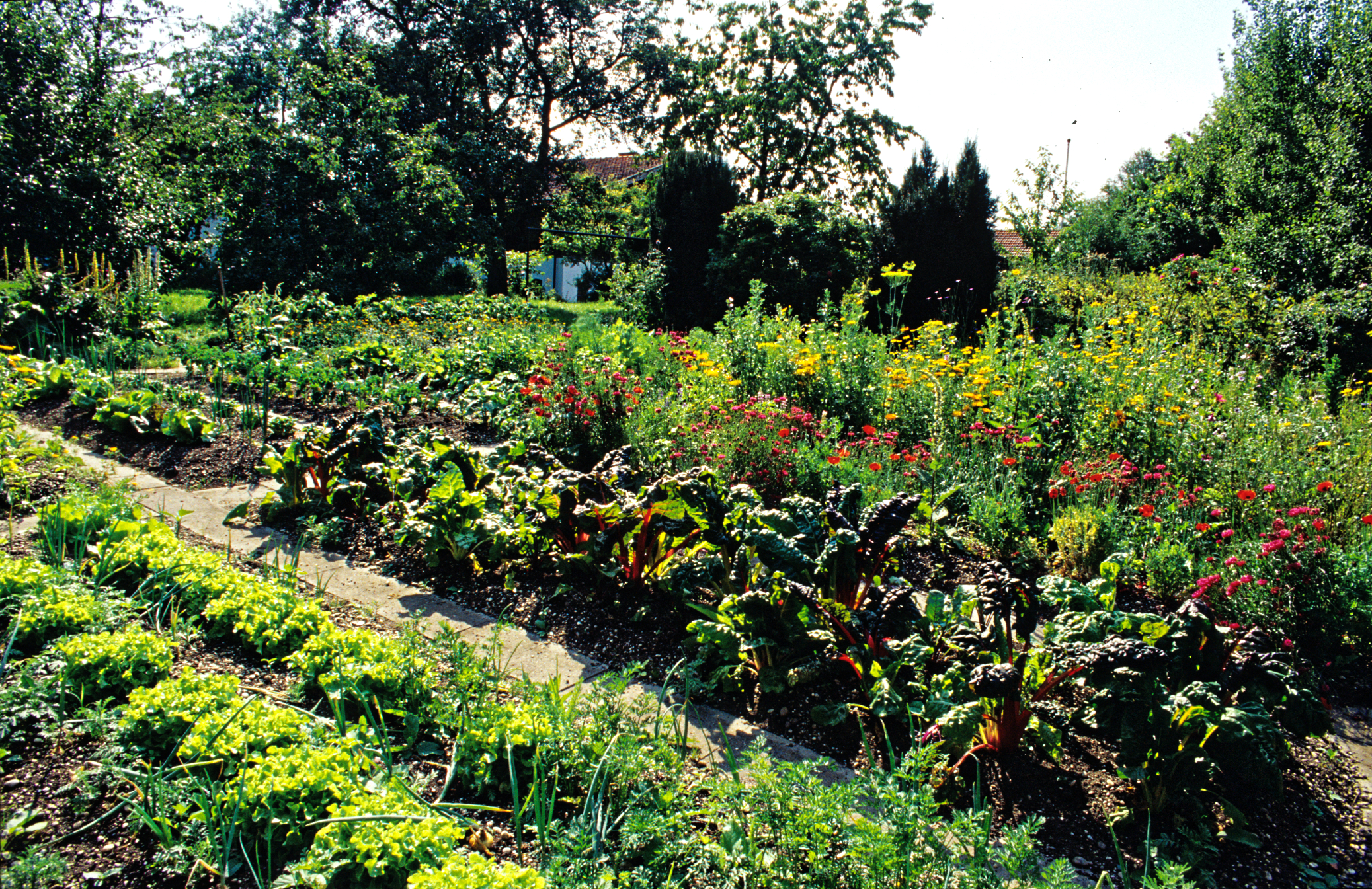 Mischkulturbeet im Nutzgartenbereich des Querbeetgartens